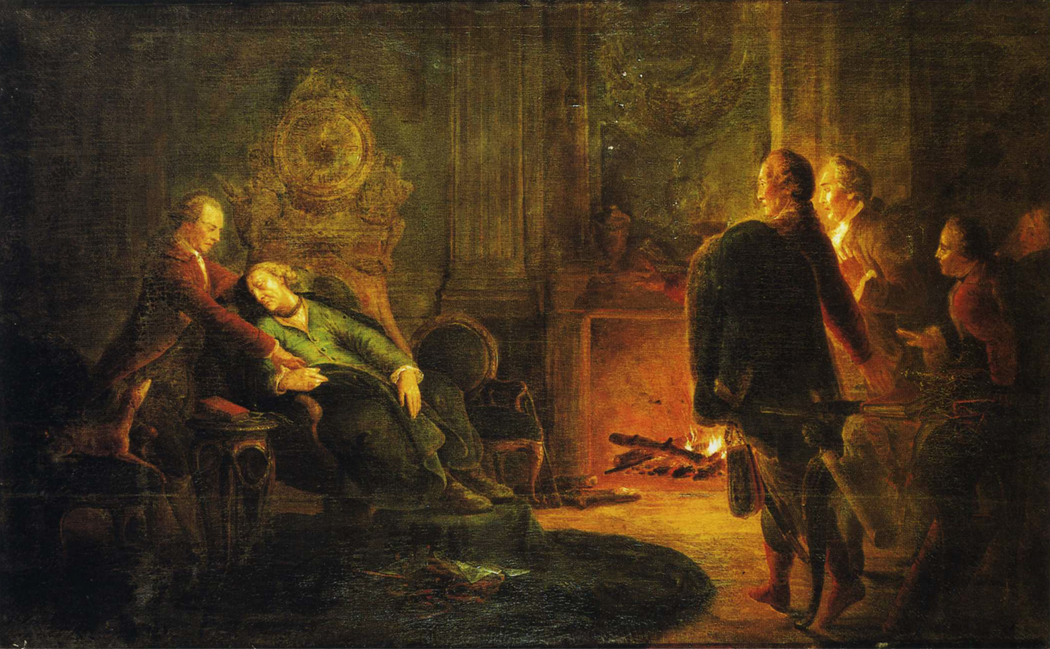 Der Tod Friedrichs des Großen (Bernhard Rode 1786/87).